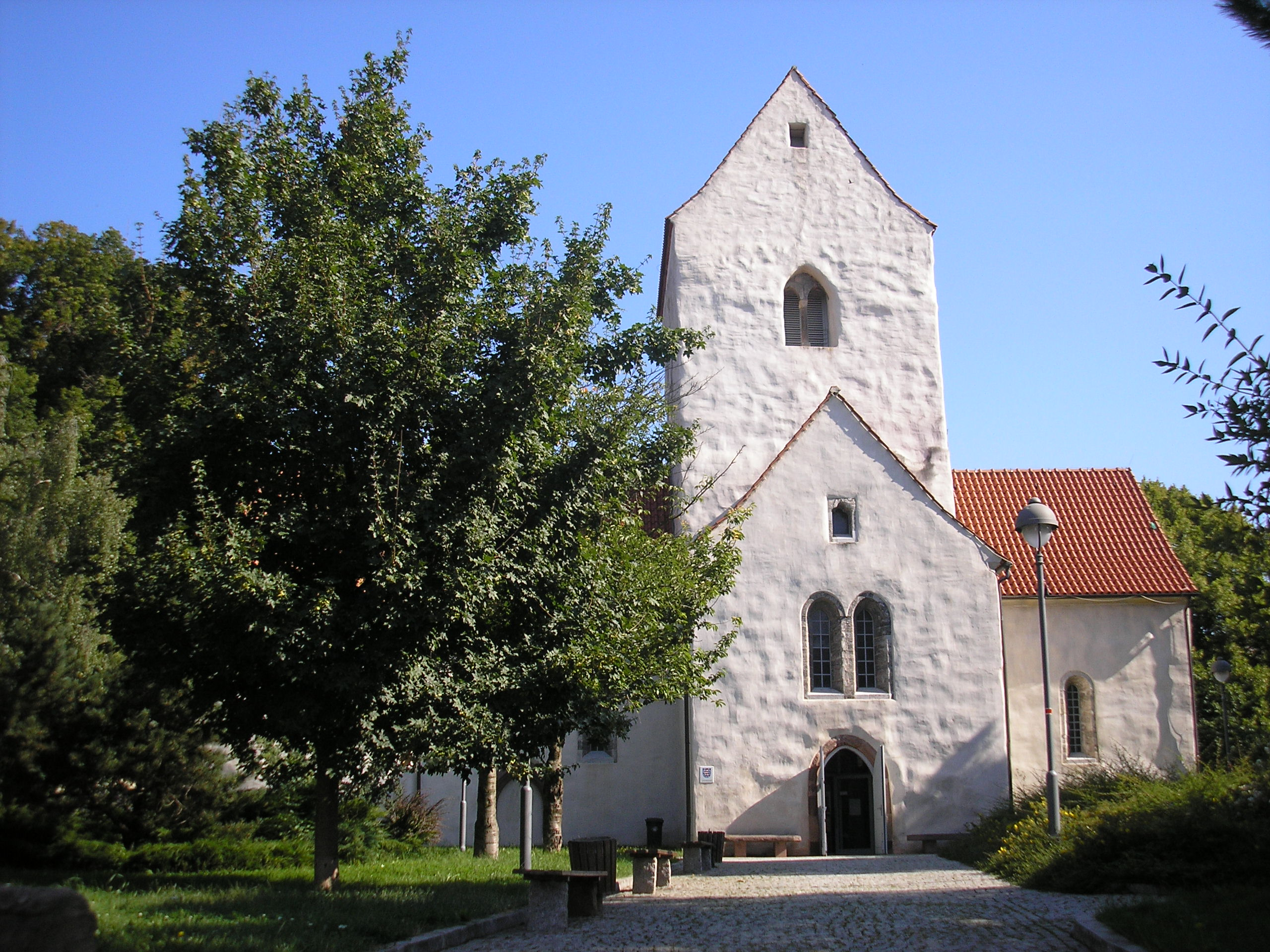 Die Veitskirche in Artern (Thüringen).